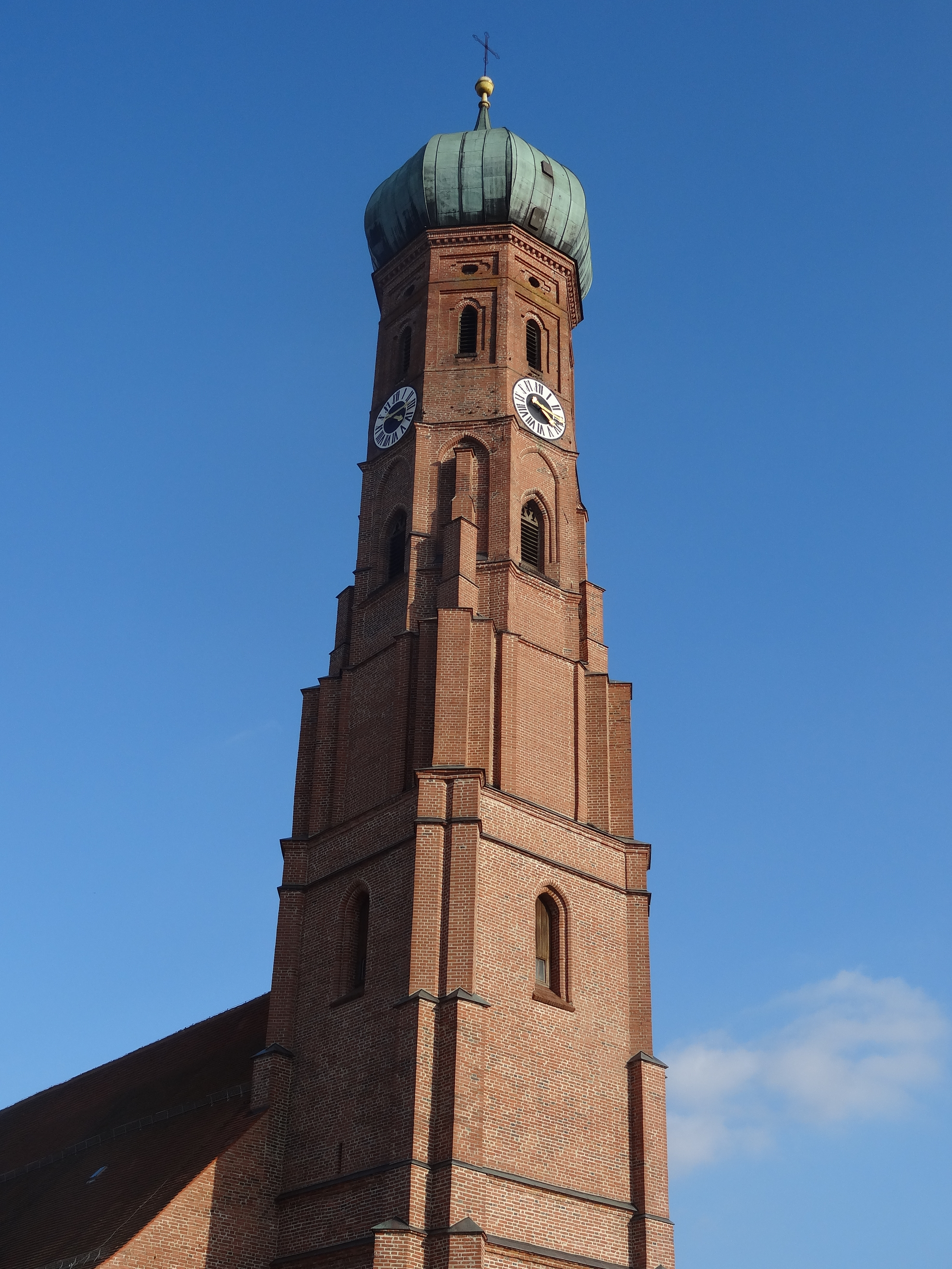 Der 75 Meter hohe Turm der Stadtpfarrkirche Mariä Himmelfahrt in Vilsbiburg